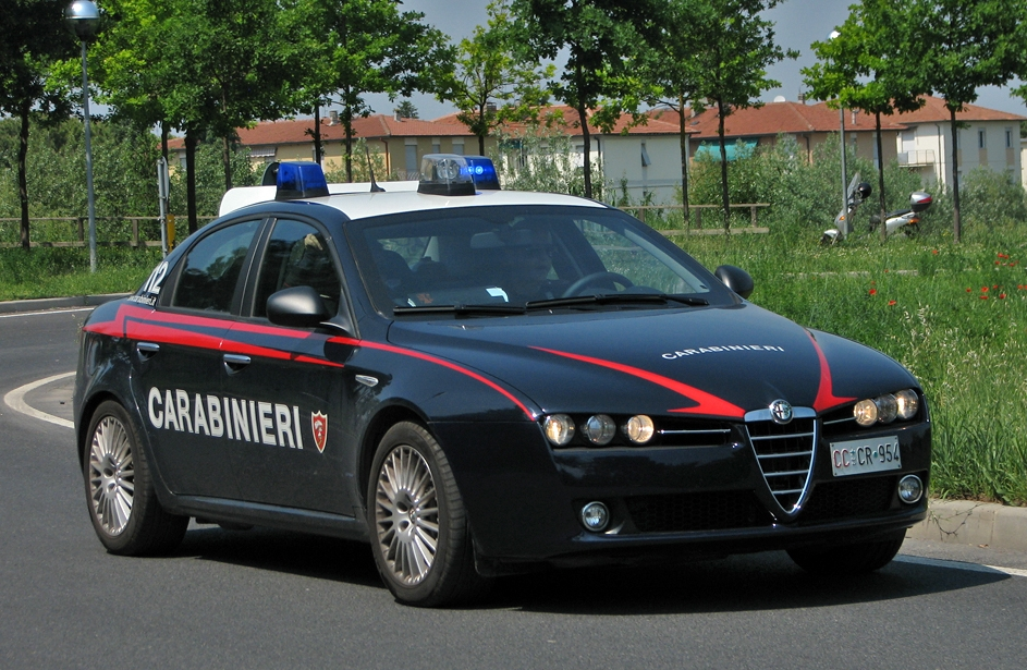 Alfa Romeo 159 Carabinieri Nucleo Operativo Radiomobile